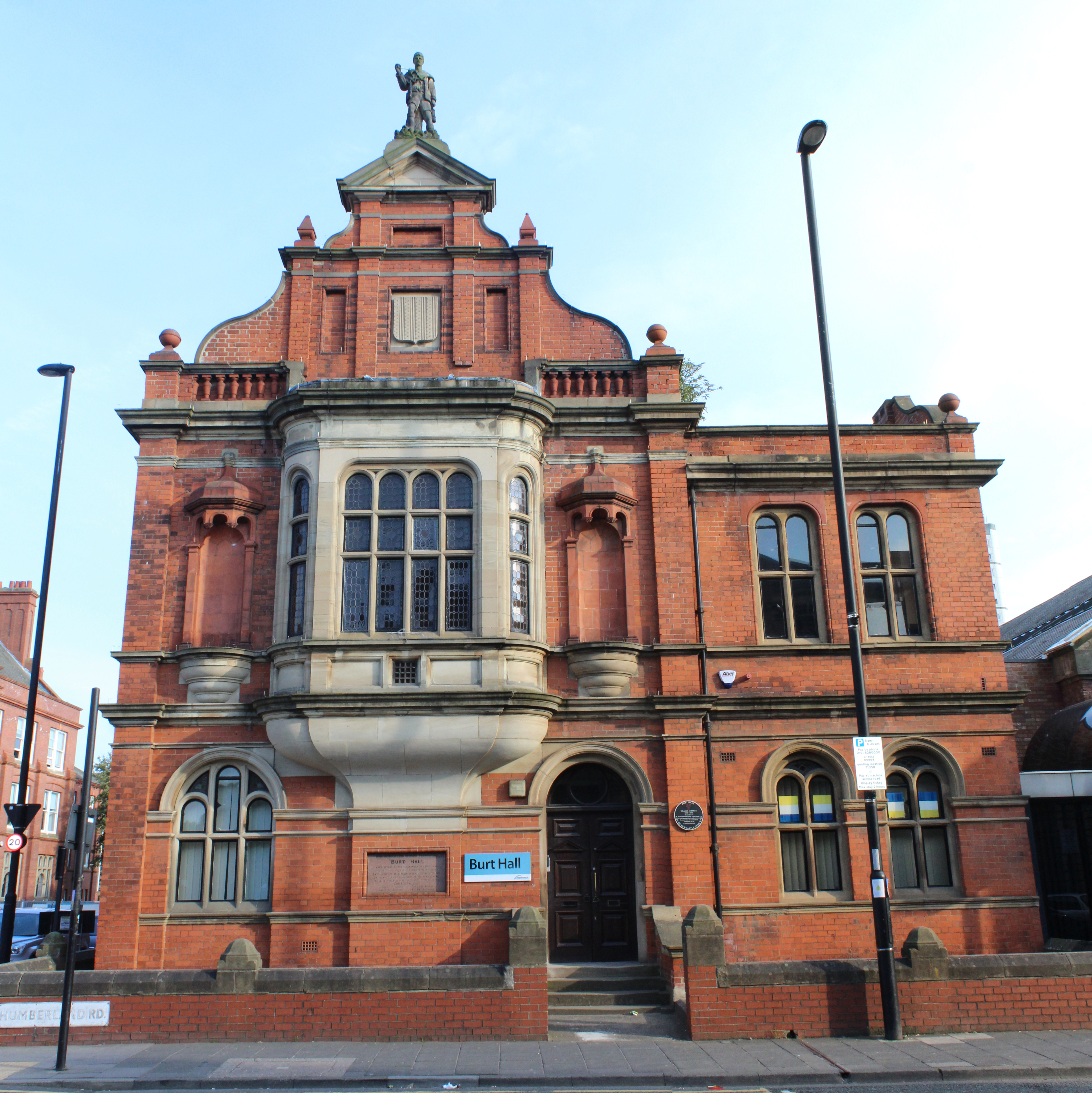 Burt Hall, Newcastle upon Tyne.